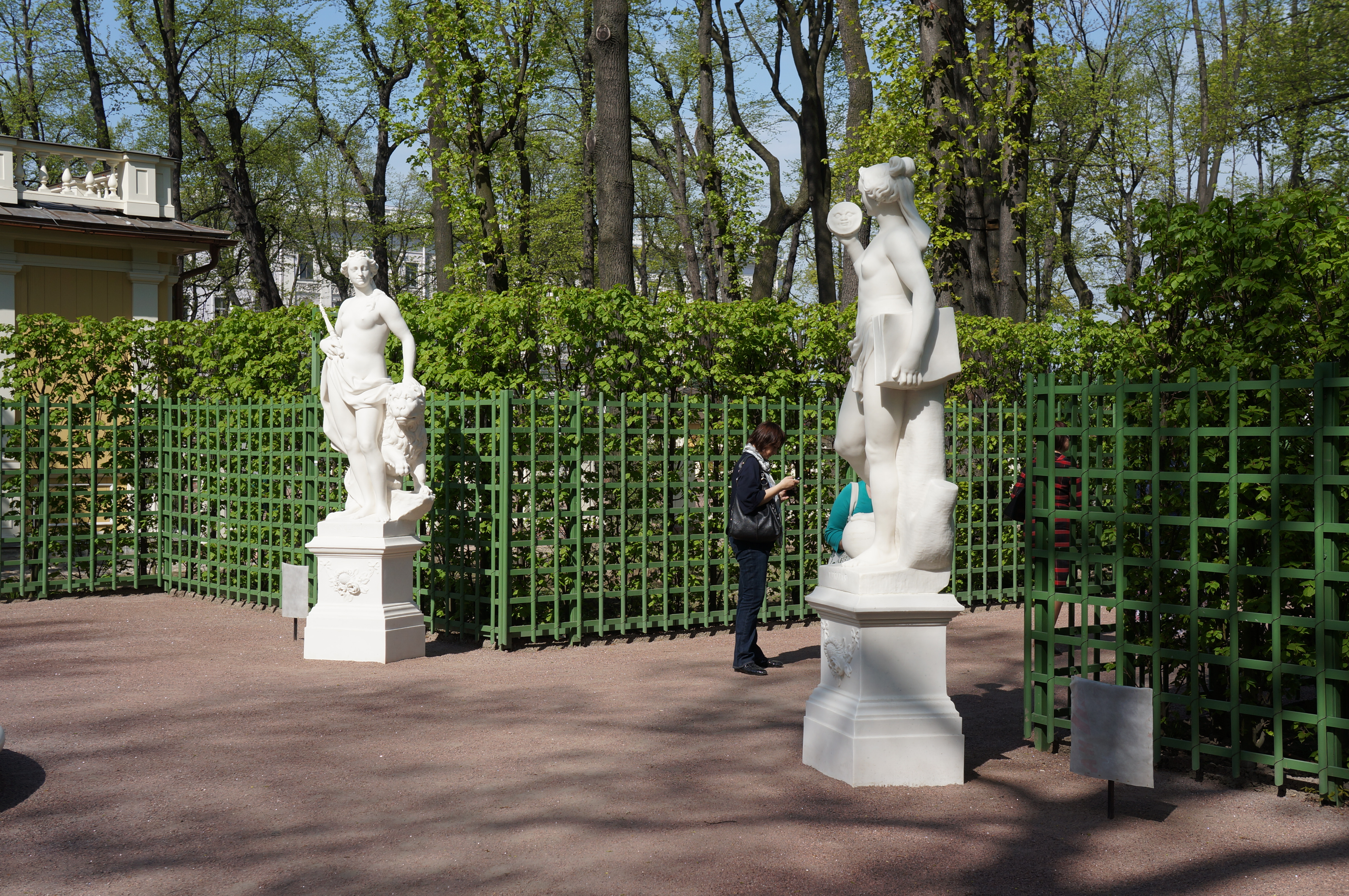 Скульптура Летнего сада. Статуи и бюсты.